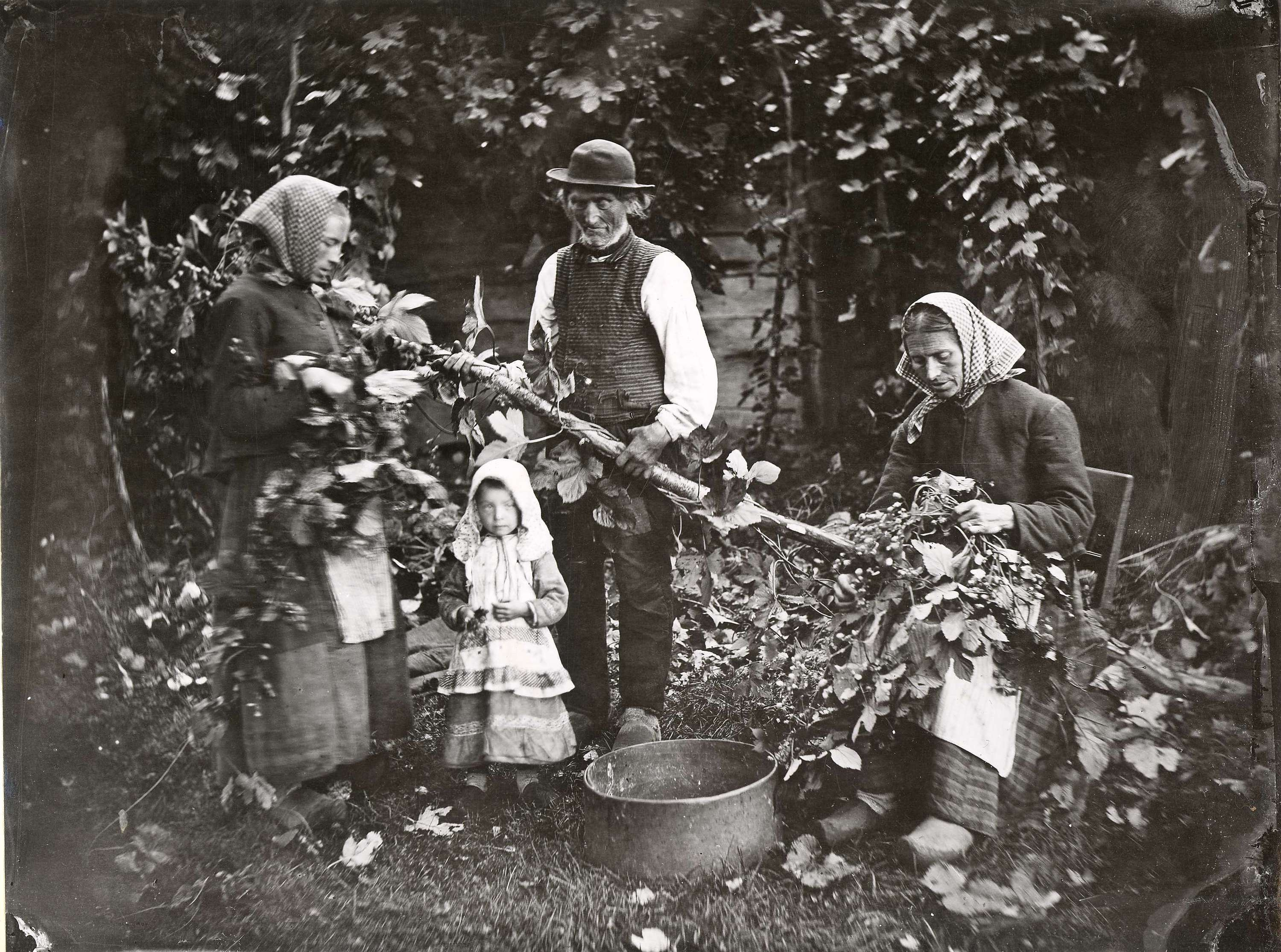 Skörd av humlekottar från en fälld humlestör. En man, två kvinnor och en liten flicka. Halland, Sverige.